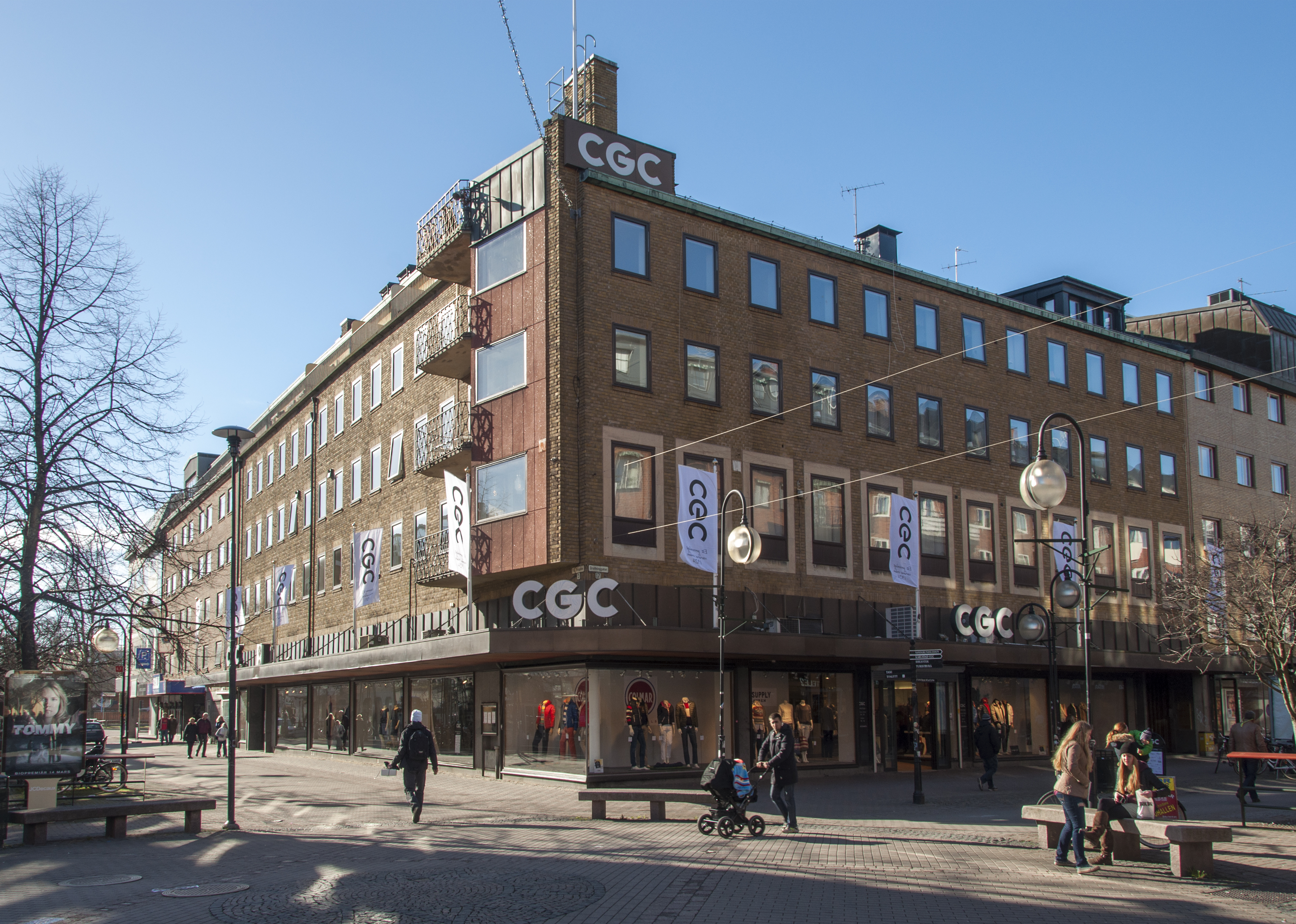 CGC-huset, Duvan 7 Drottninggatan / Västra torggatan, Byggår 1951. Arkitekt Björn Hedvall